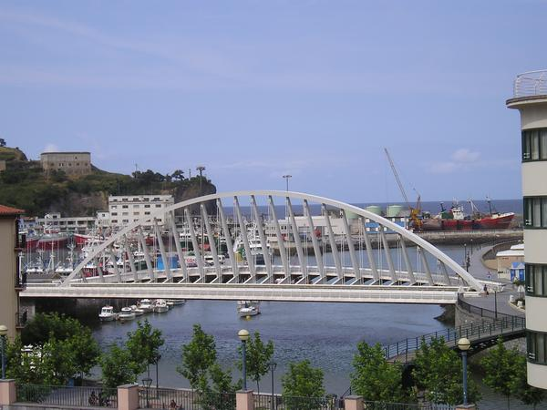 Ondarruko Calatrava zubia.